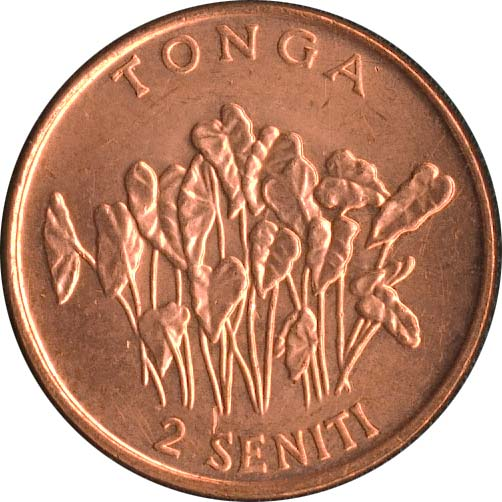 Lea faka-Tonga: no original description